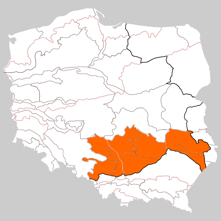 Wyżyny Polskie